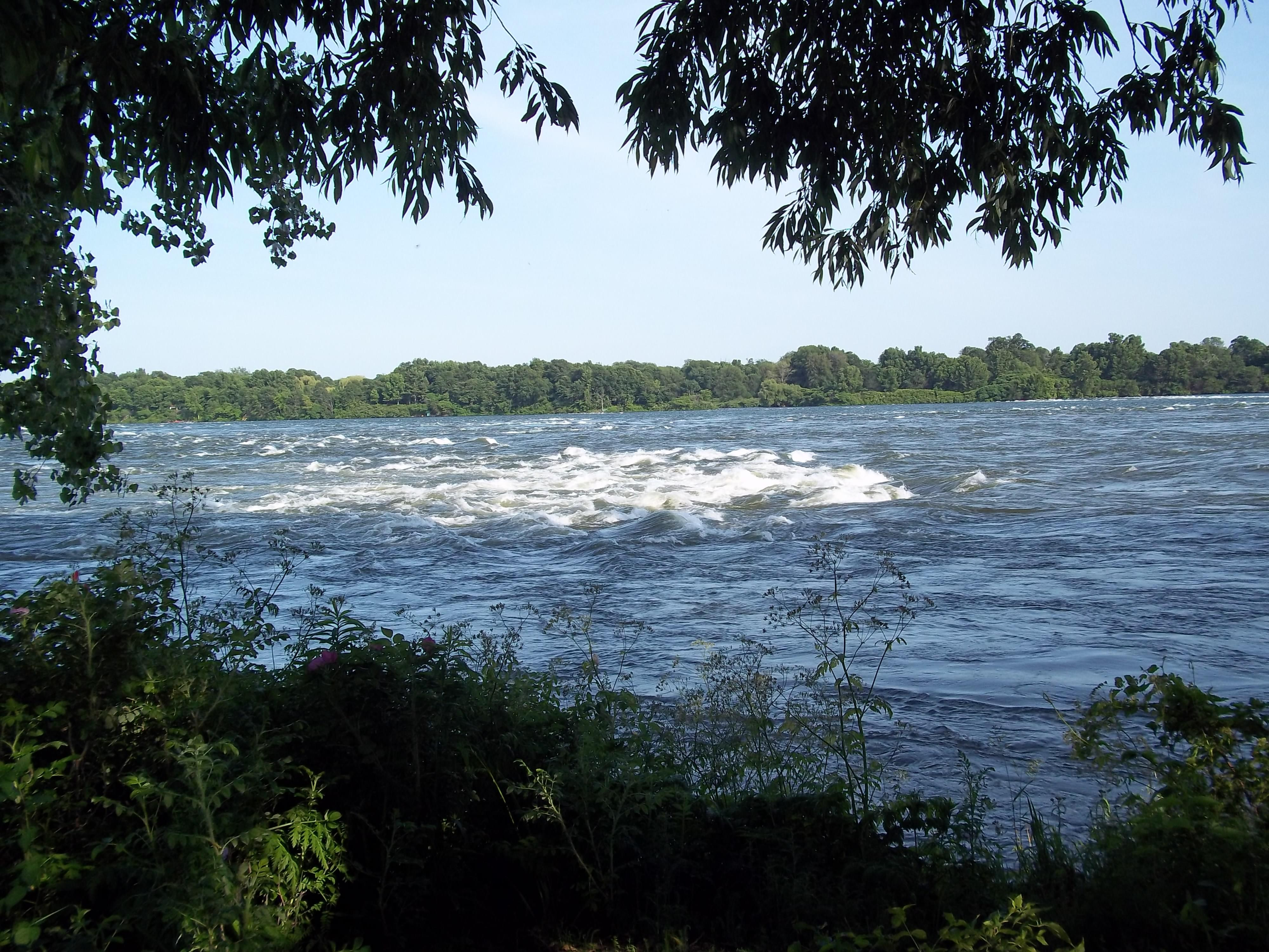 Parc des Rapides, LaSalle, Montréal, Québec